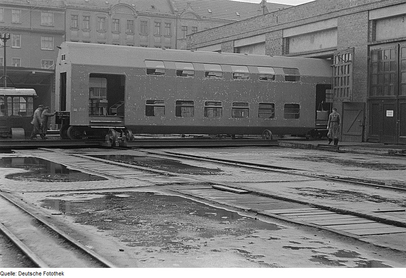 Original image description from the Deutsche Fotothek Außenansicht eines Doppelstockwaggons-Grundgerüst